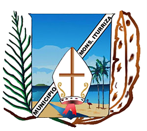 Escudo del municipio Monseñor Iturriza, estado Falcón, Venezuela